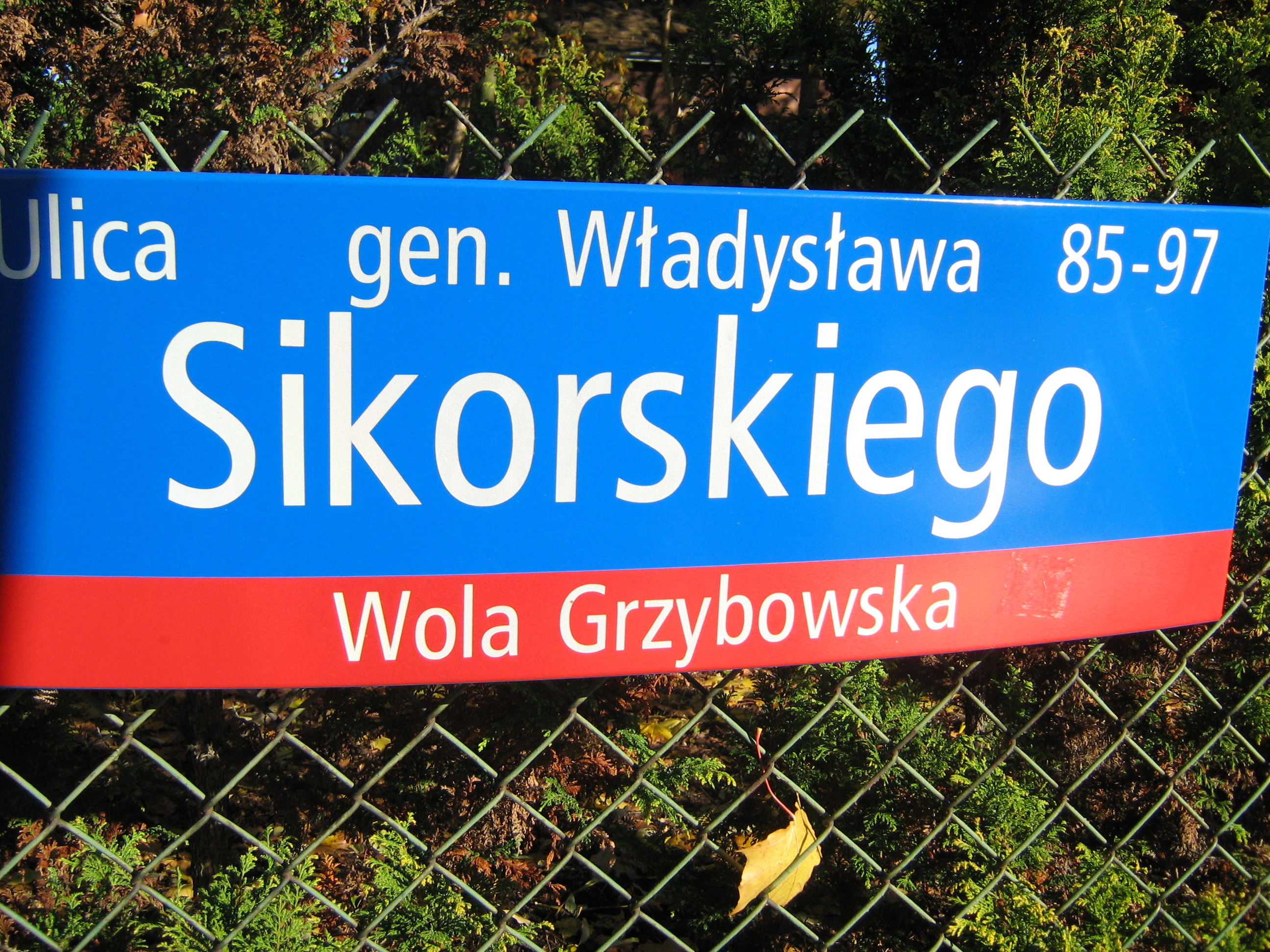 Wladyslaw Sikorski street in Warsaw Wesola - table information (Poland) ulica gen. Władysława Sikorskiego w Warszawie-Wesołej i tablica z nazwą ulicy MSI